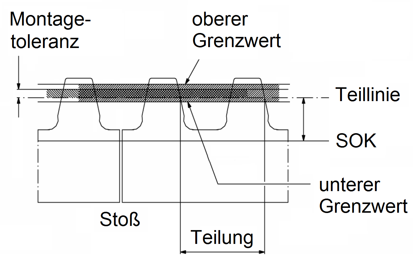 Montagetoleranz für die Höhenlage der Zahnstange sowie oberer und unterer Grenzwert für den Teilkreis der Zahnräder